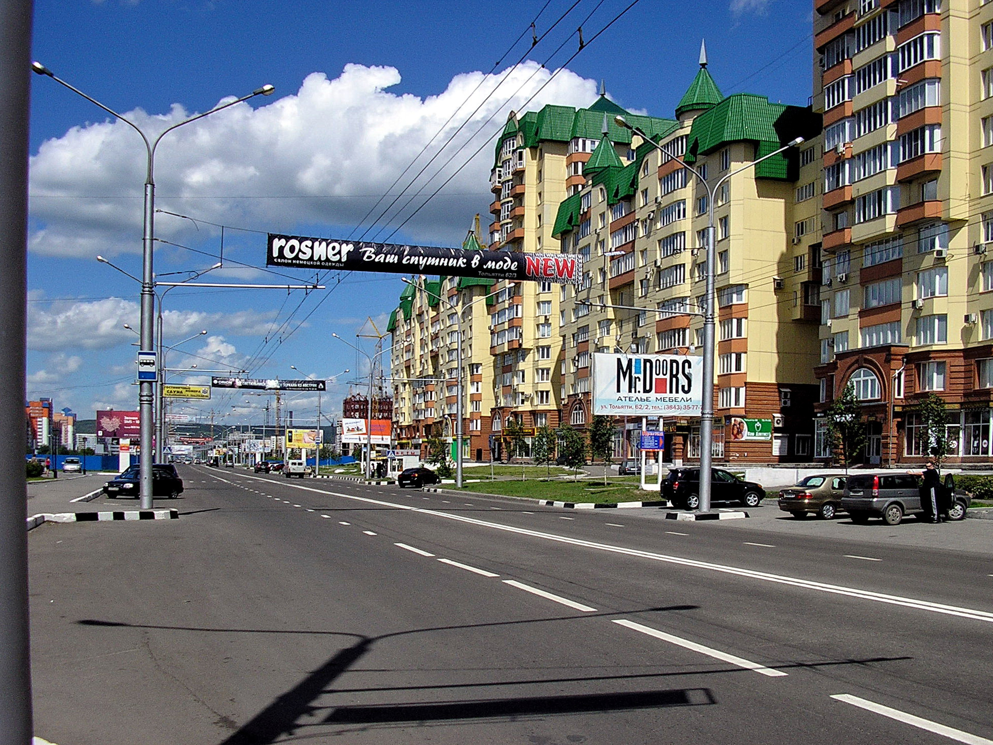 Ул. Тольятти